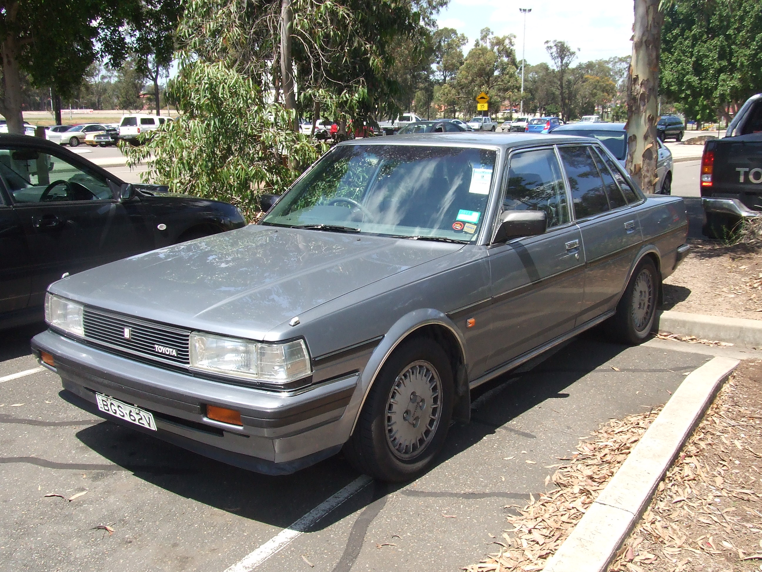 Toyota Cressida MX73